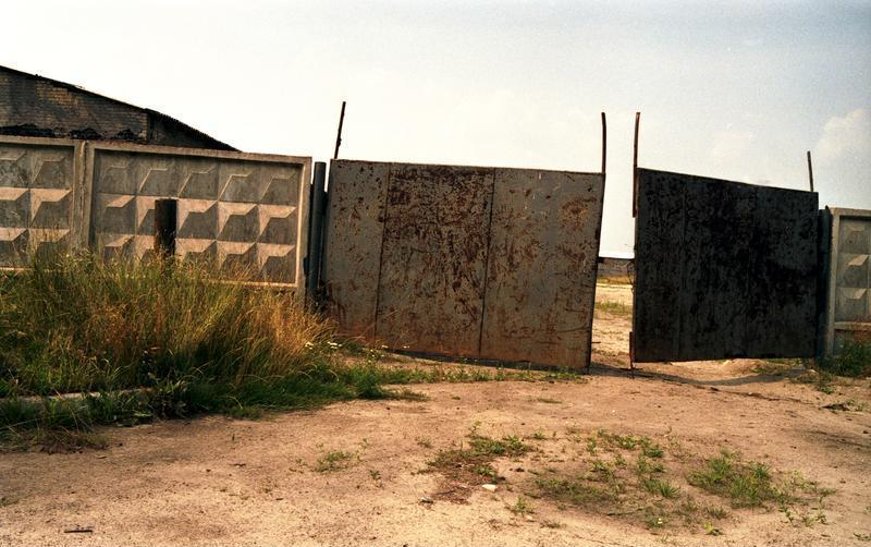 11.-18.8.1991 Bundesland Sachsen-Anhalt Bei Stendal, Gelände der ehemaligen sowjetischen Streitkräfte